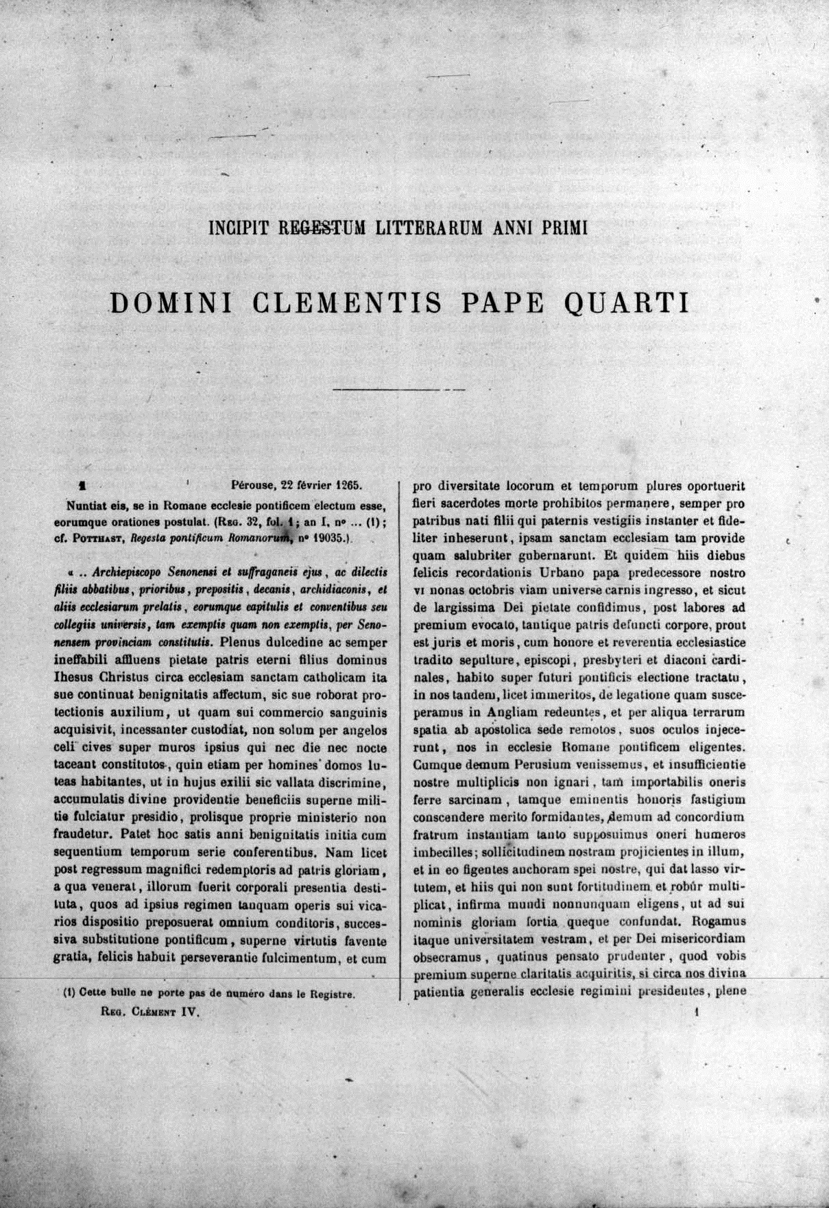 Pagina 1